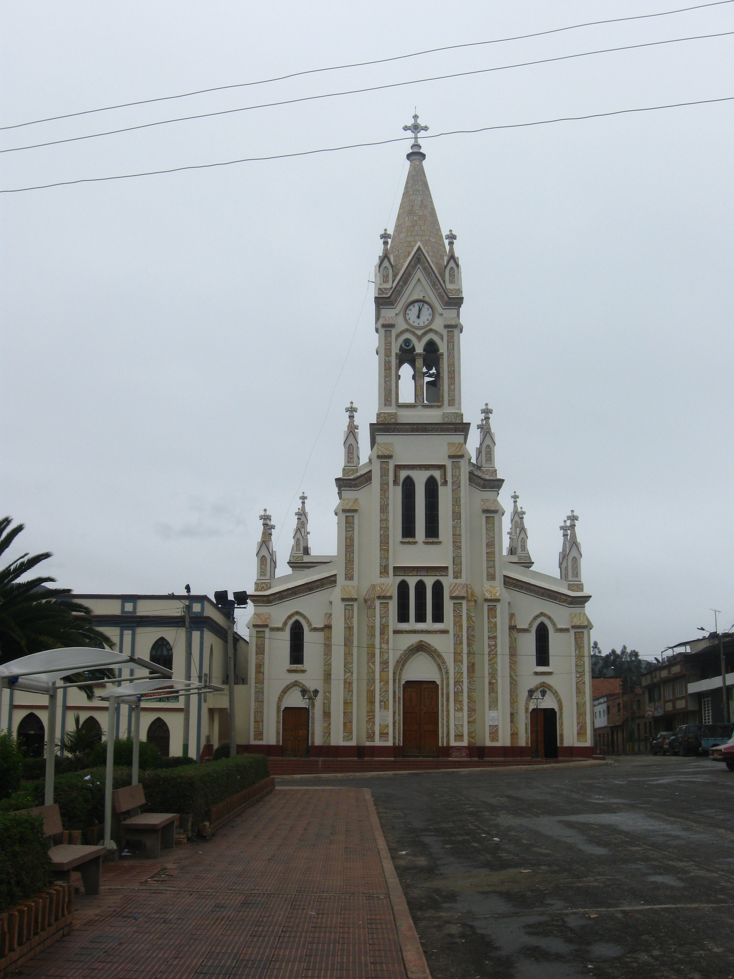 Iglesia principal del pueblo de Cerinza.